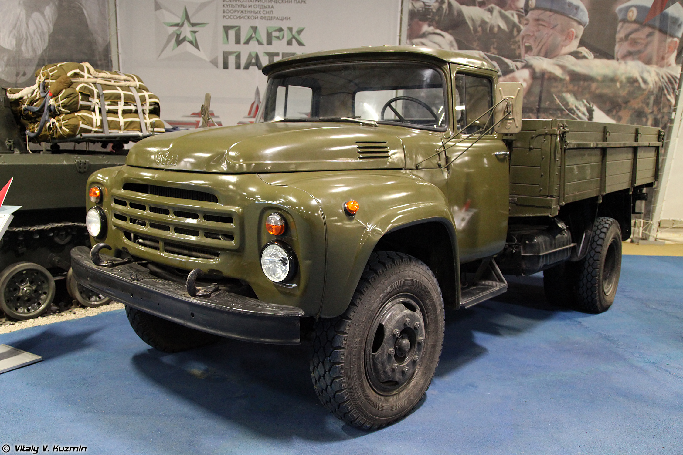 ЗИЛ-130 (ZIL-130)